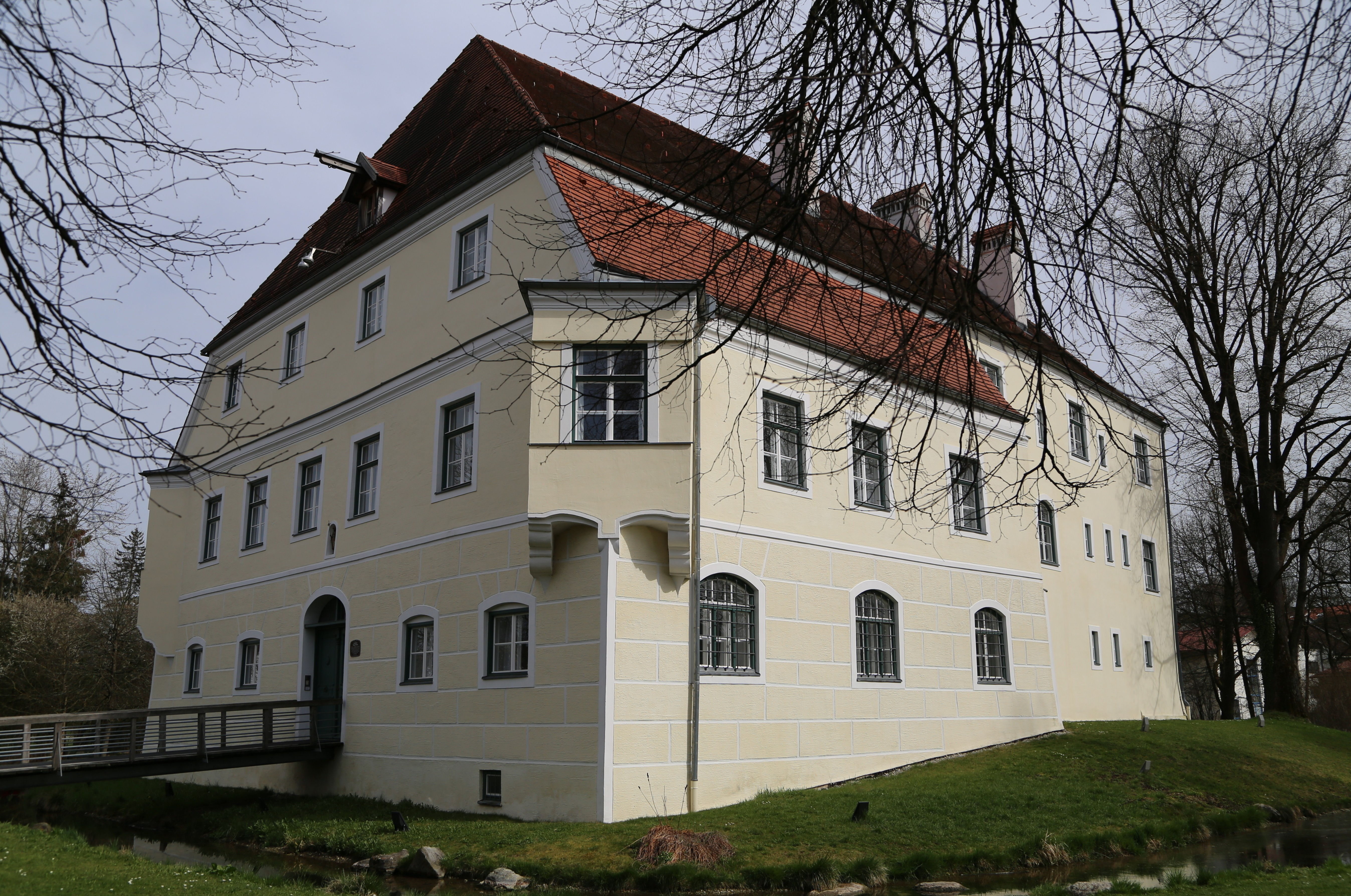 Johannesstraße 9, Neumarkt-Sankt Veit; Schloss Adlstein, ehemaliges Pflegschloss des Gerichts Neumarkt, jetzt Rathaus und Stadtarchiv Stattlicher zweigeschossiger Bau mit Halbwalmdach, an der Nordost- und Nordwestecke Kastenerker über profilierten Konsolen vorkragend Ehemalige Schlosskapelle mit Ausstattung; erbaut 1478 unter Verwendung älterer Bauteile, um 1504 im Landshuter Erbfolgekrieg ausgebrannt, 1509/10 Wiederhaufbau, im 16. und 18. Jahrhundert z. T. baulich verändert Ehemalige Parkanlage